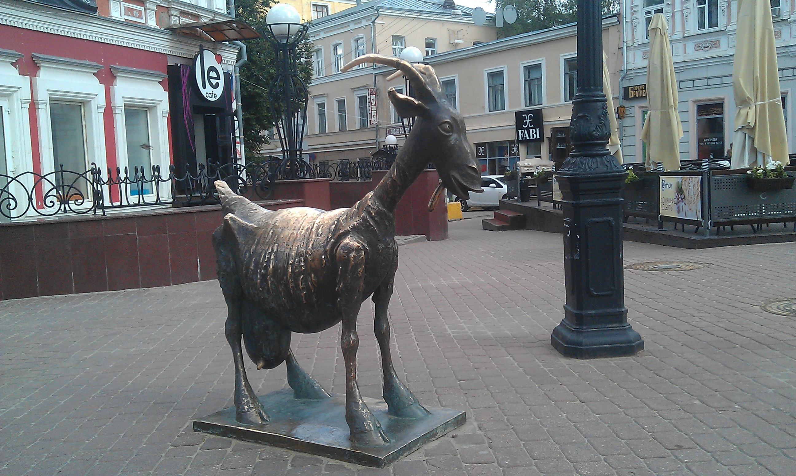 Улица в Нижнем Новгороде